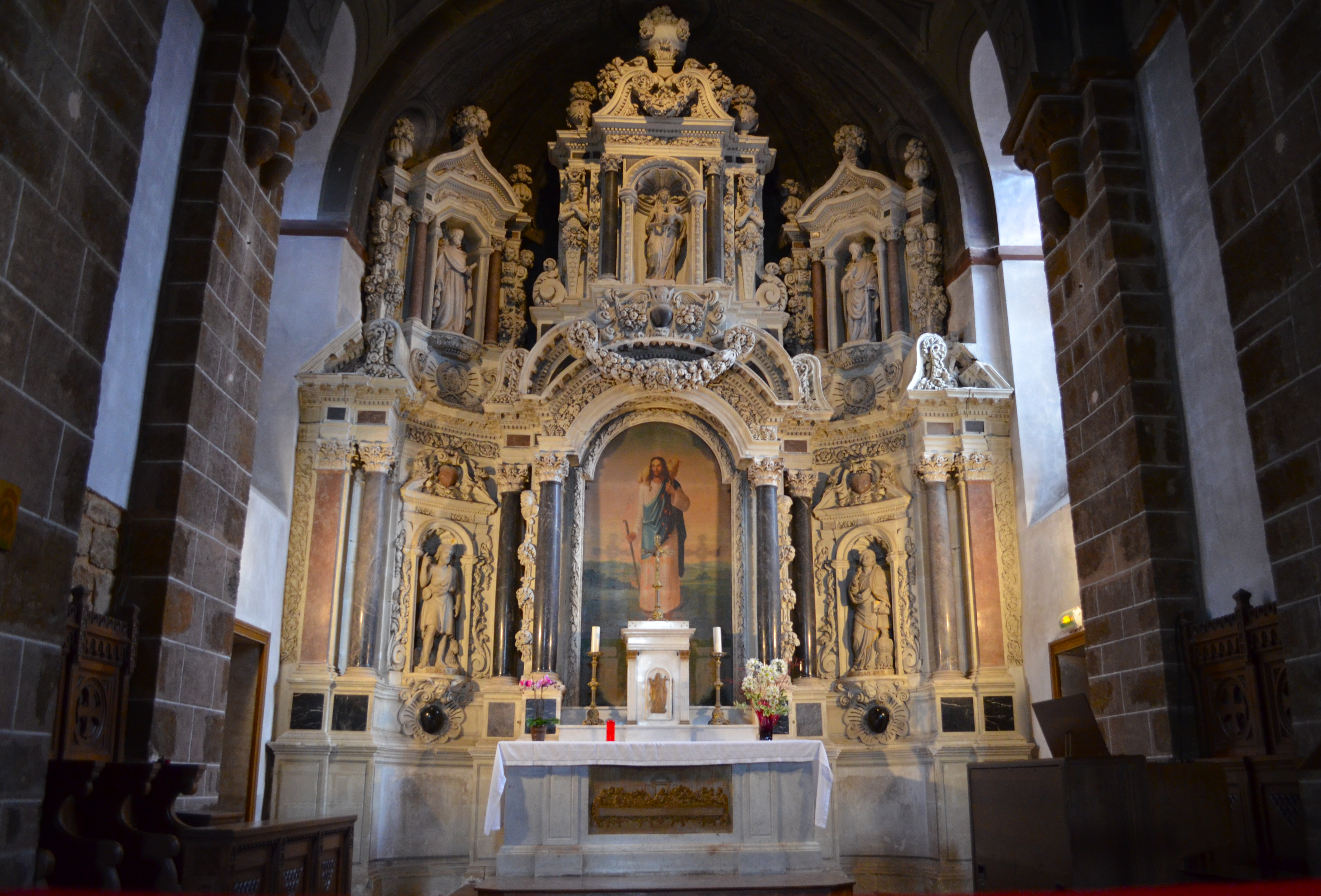 Église Saint-Jean de Béré - Châteaubriant (Loire-Atlantique) - retable du maître-autel.